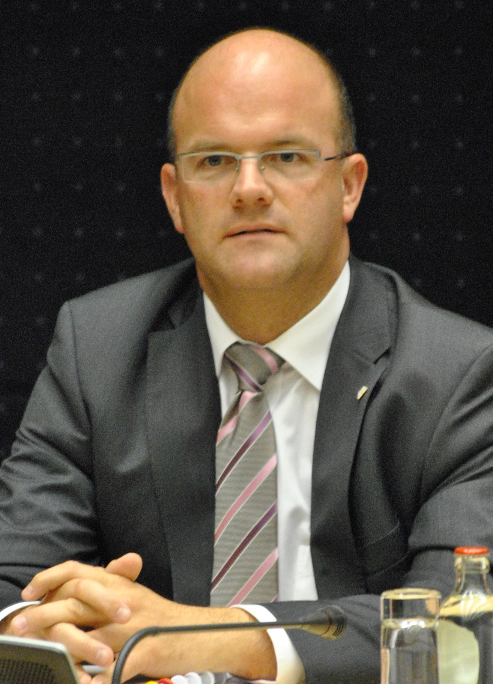 Philippe Courard Belgique Politique